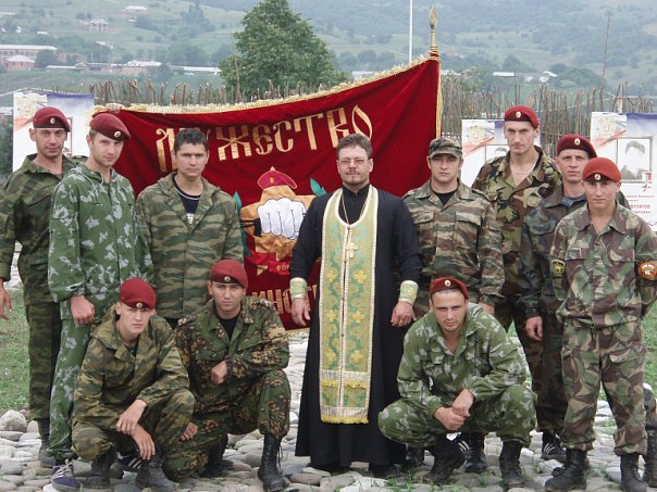 Знамя 7ОСН